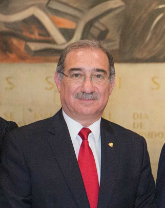 Informe Anual del Presidente de la SCJN